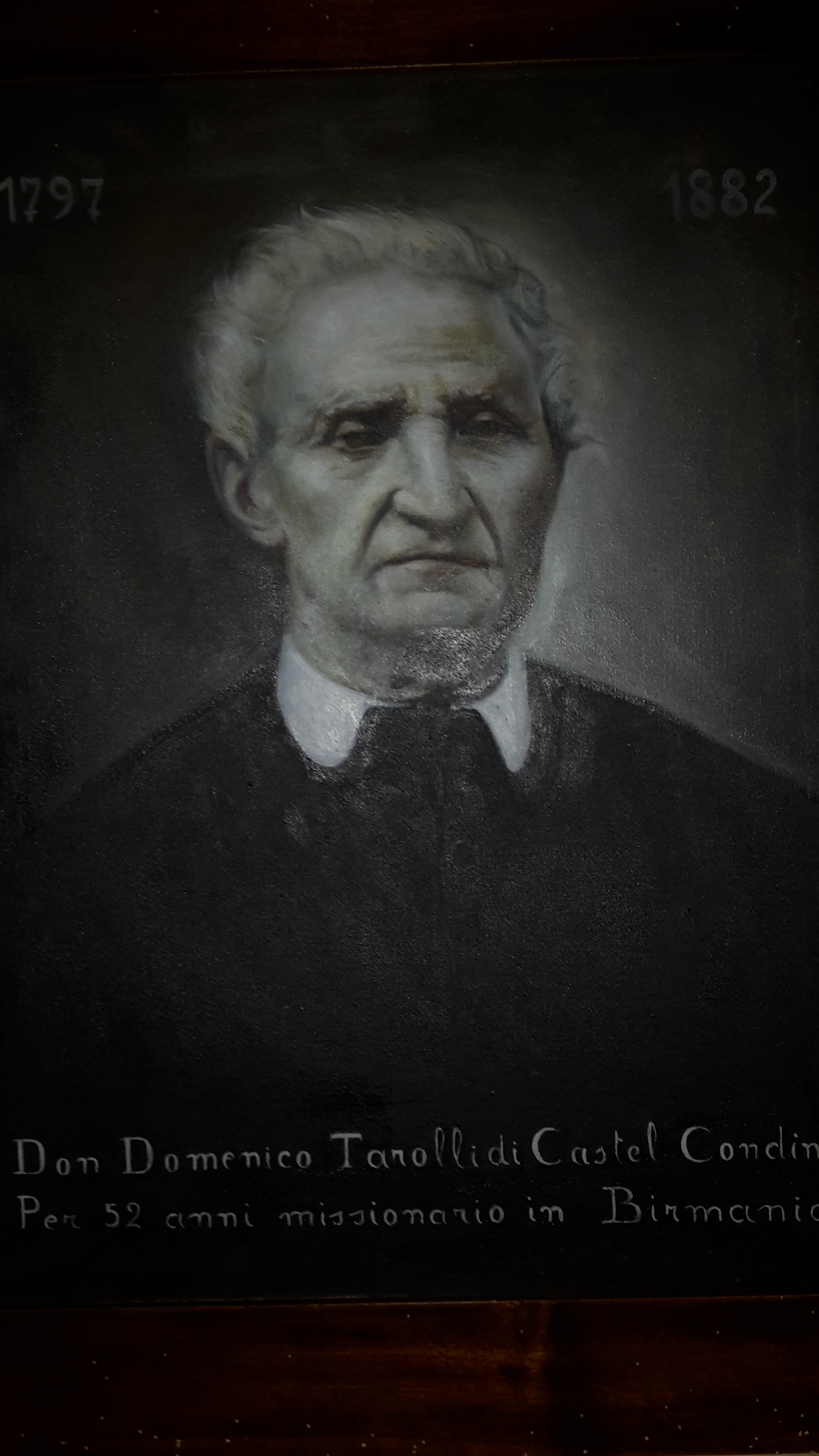 Foto del quadro donato dal nipote don Beniamino Tarolli alla Chiesa di san Giorgio in Castel Condino nel Natale del 1937